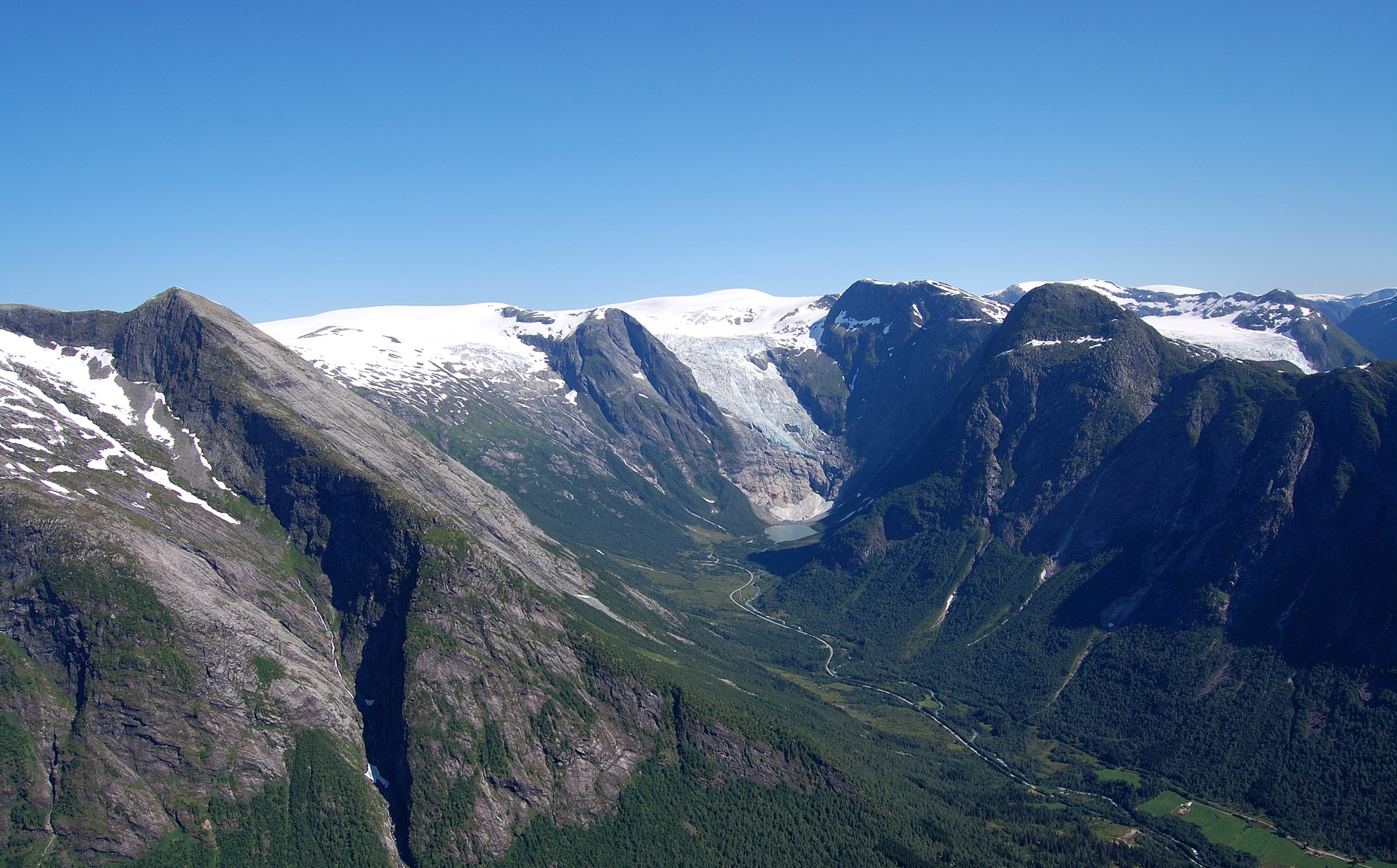 Blånipa-Bøyabreen-Skeisnipa sett frå Rundenipa